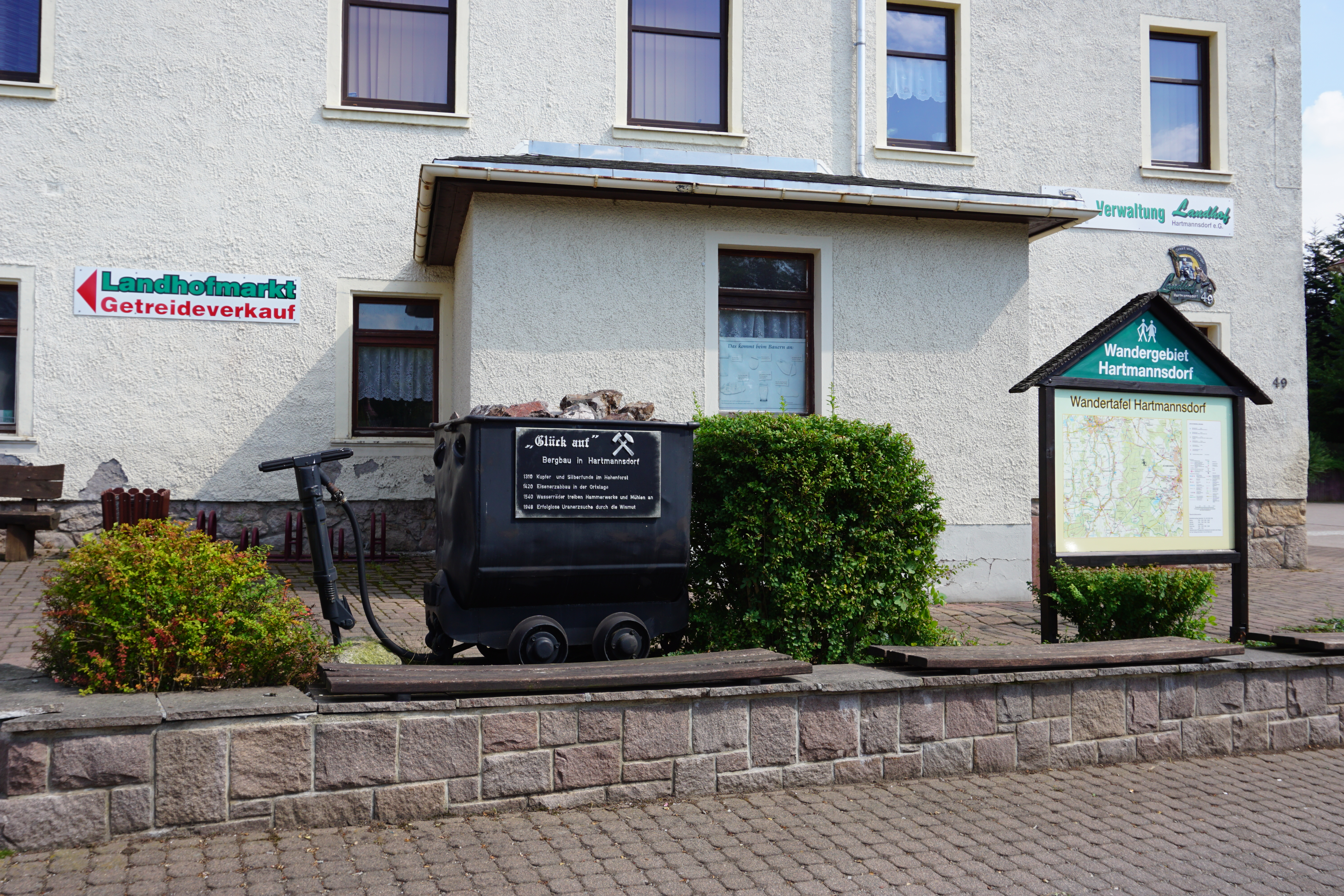 Hunt mit Plakette zur Bergbaugeschichte vor der ehemaligen Hammerschänke am Dorfplatz in Hartmannsdorf bei Kirchberg